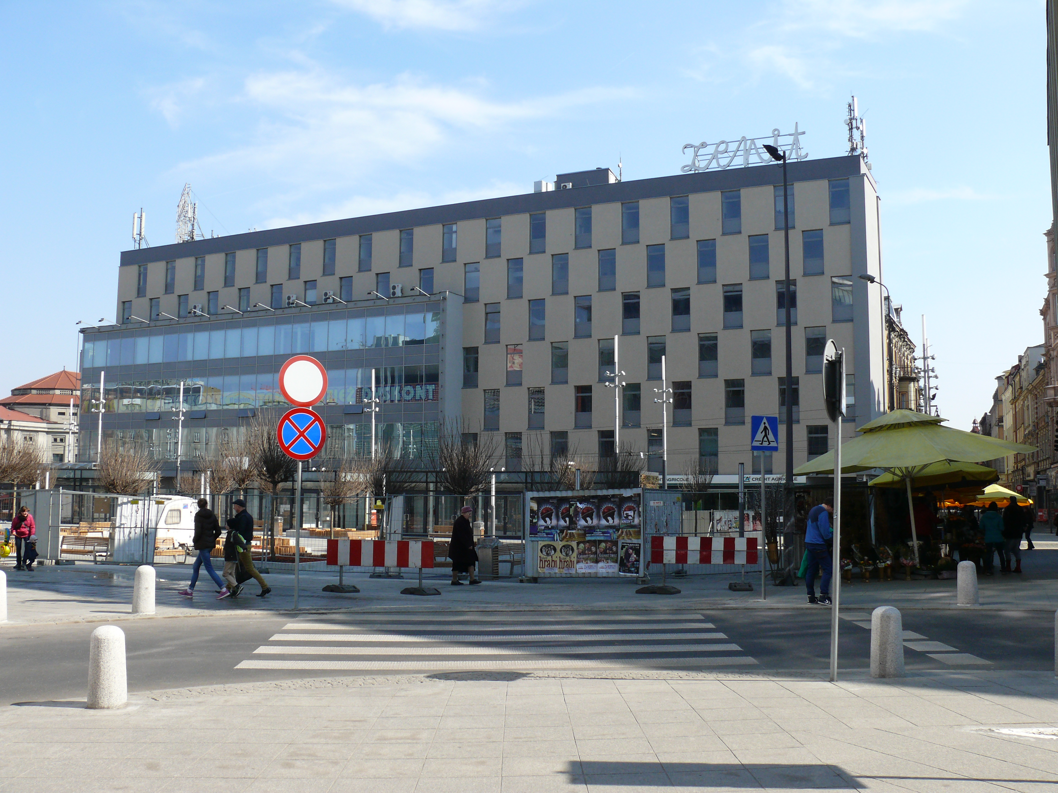 Das Kaufhaus "Zenit" auf dem Rynek in Kattowitz.